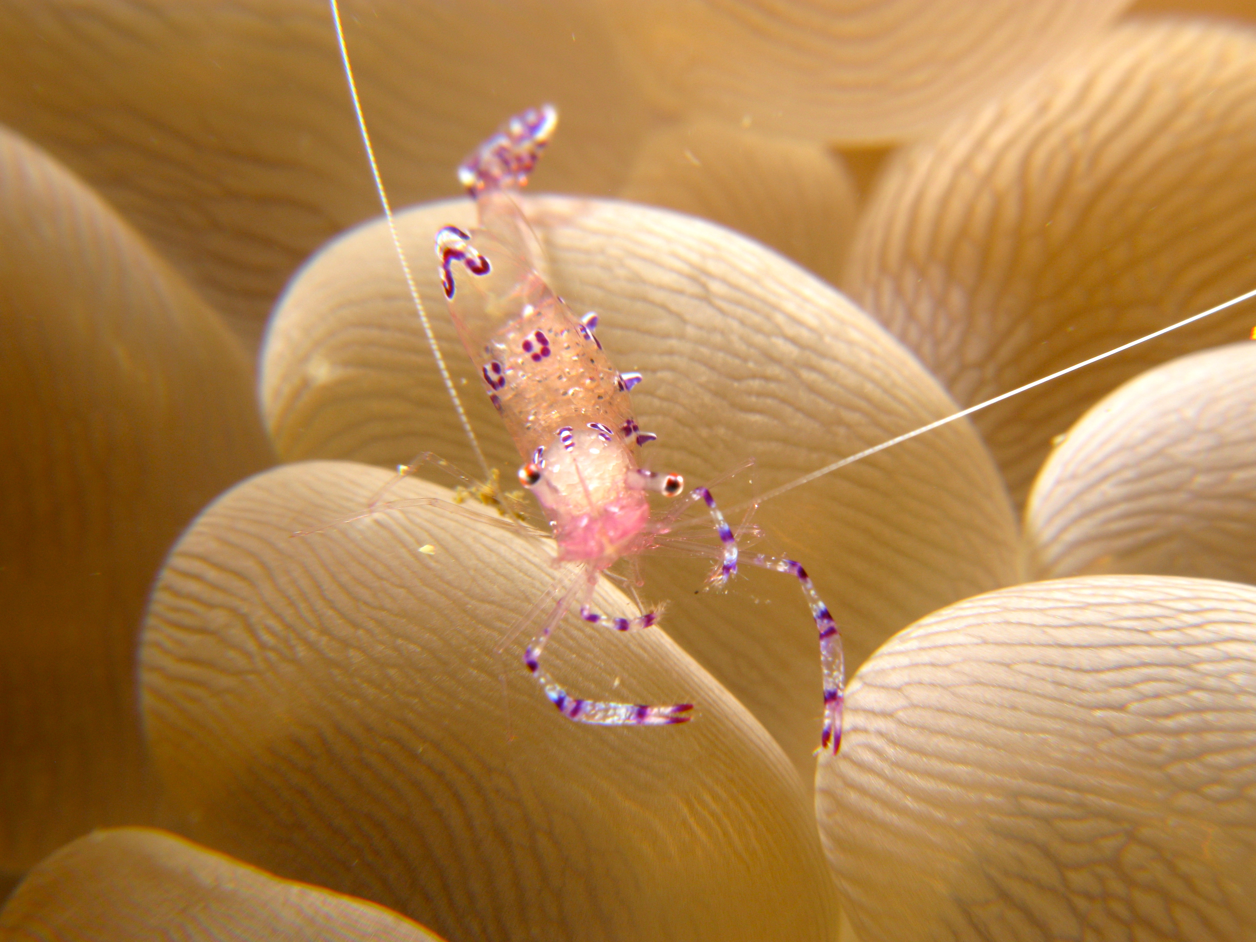 Ancylomenes (Periclimenes) tosaensis en Bitung, Indonesia